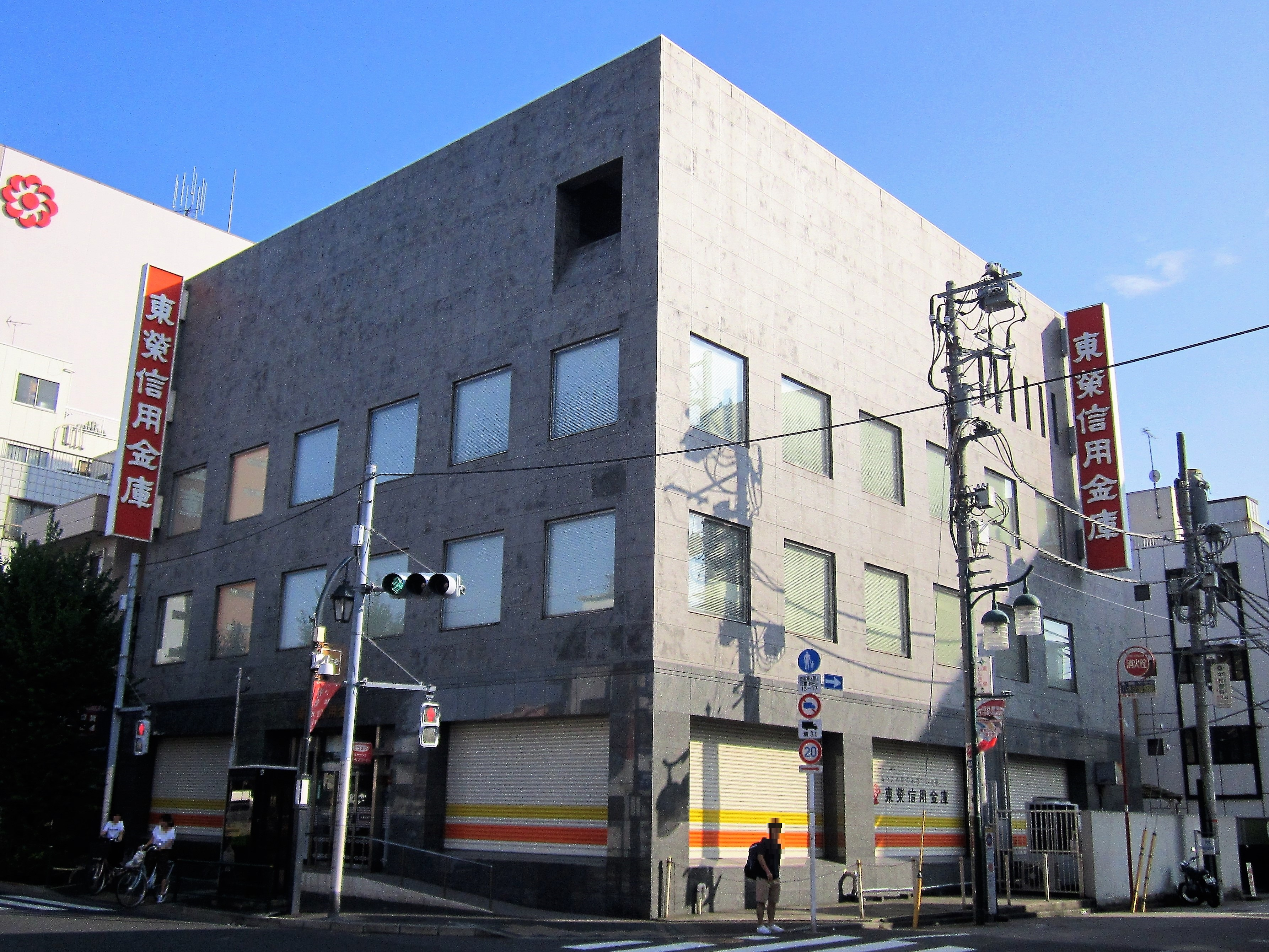 東榮信用金庫 本部・本店営業部（葛飾区新小岩）